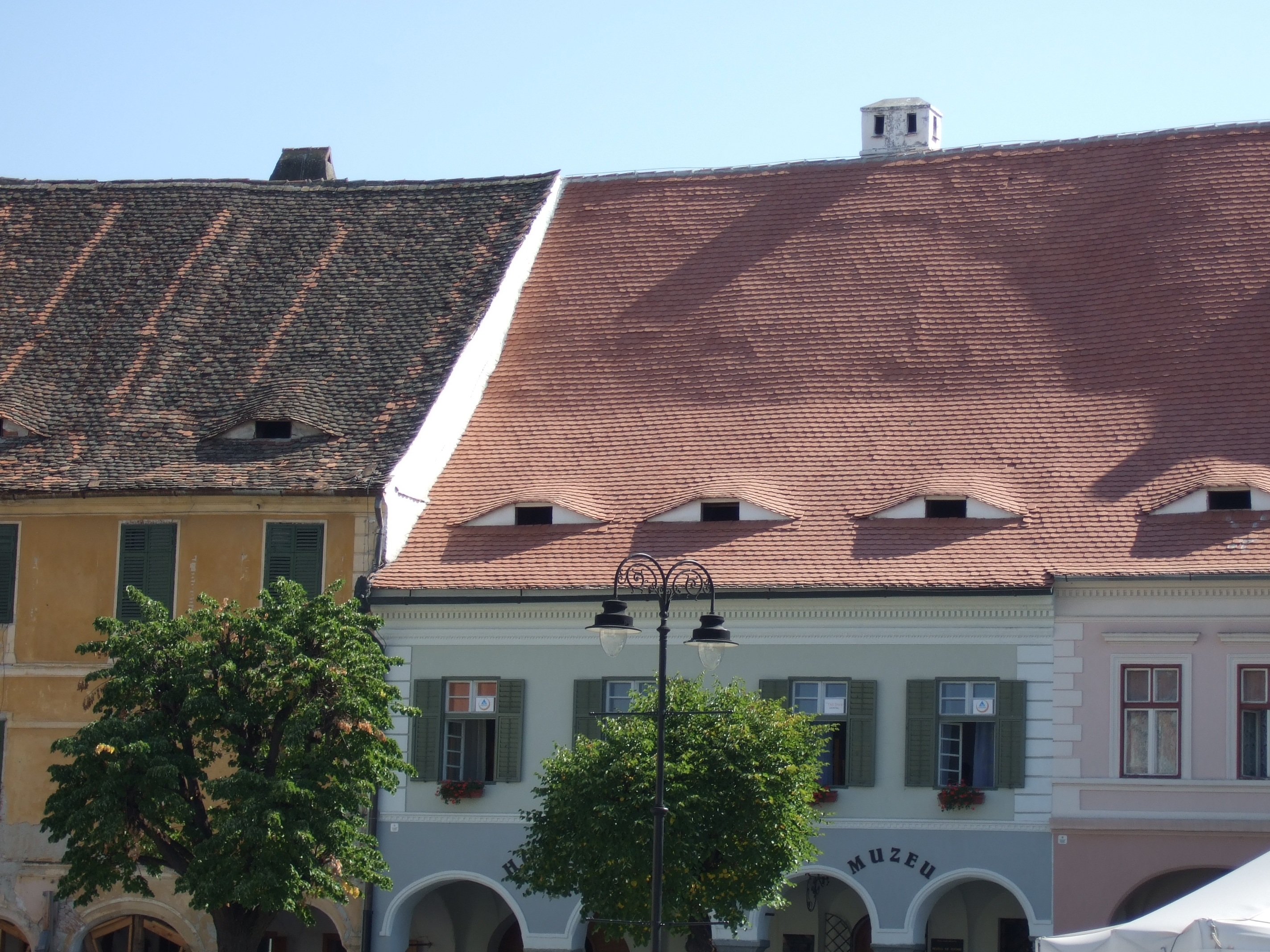 dans la ville haute